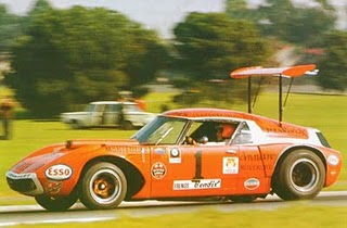 Fotografía del Prototipo conocido como la Nova Naranja que manejara Carlos Pairetti en 1969